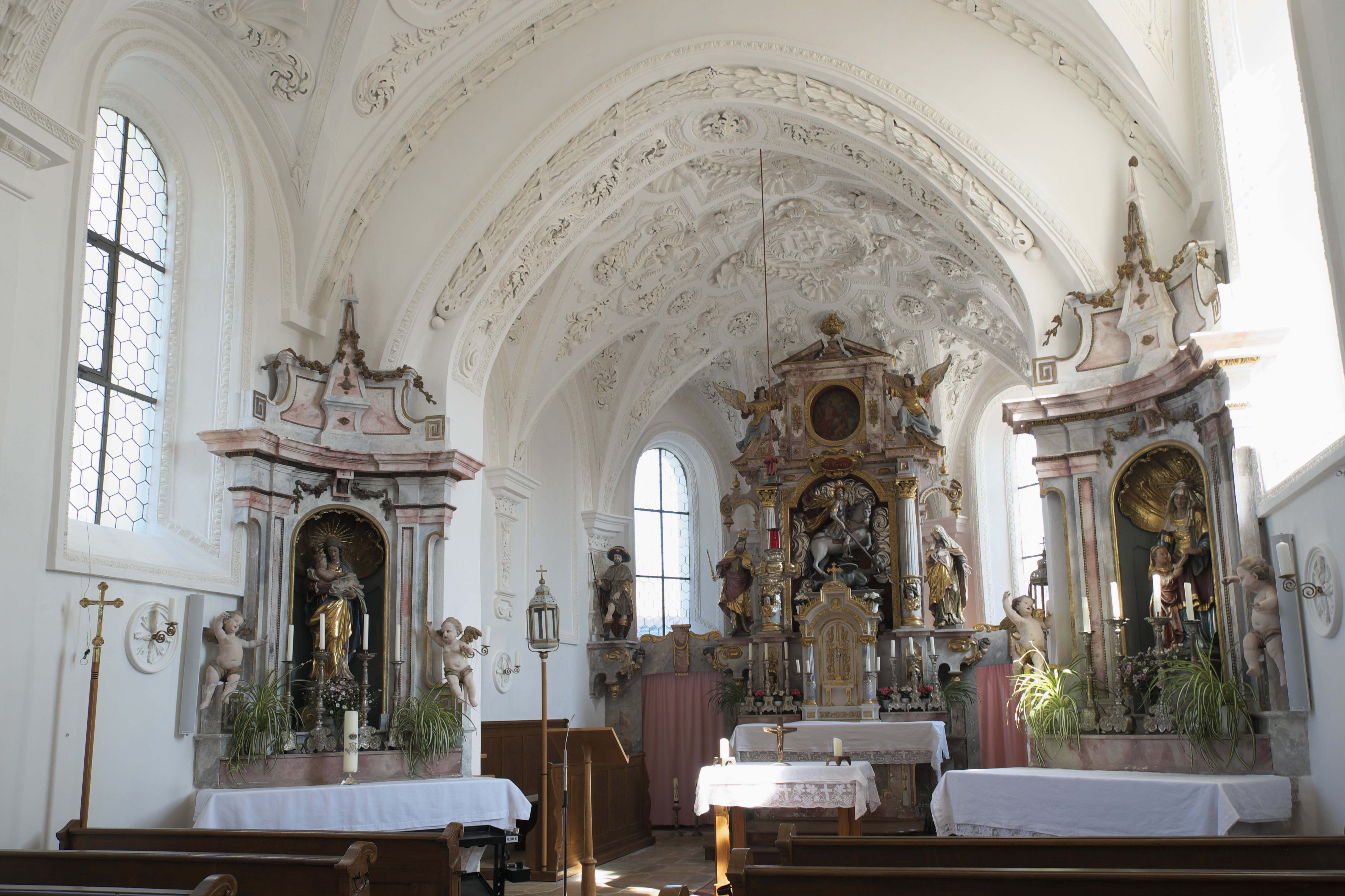 Katholische Filialkirche St. Georg in Pfaffenhofen, einem Ortsteil von Jesenwang im Landkreis Fürstenfeldbruck (Bayern/Deutschland)